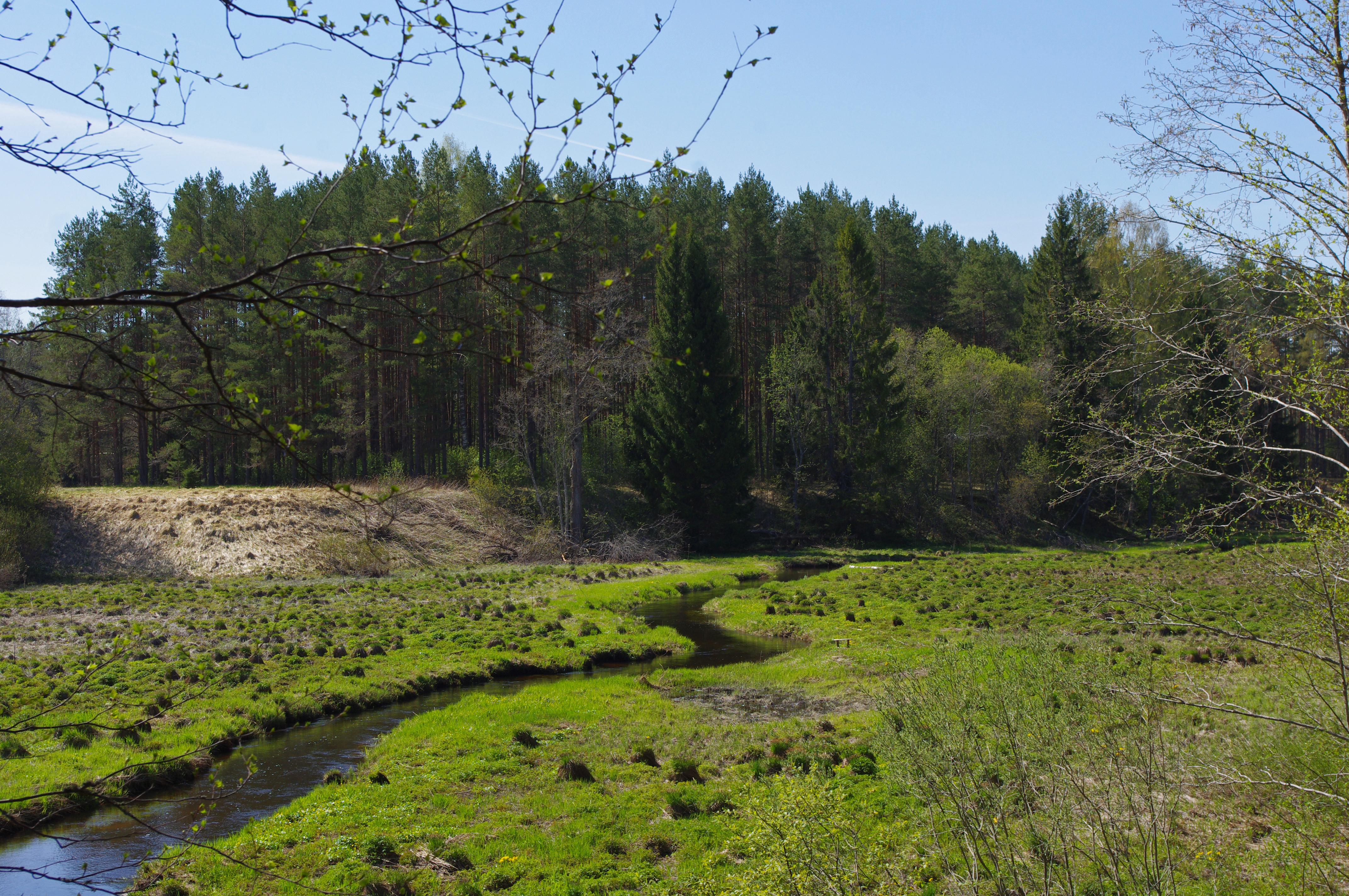 Jänijõgi suudme lähedal Harju- ja Järvamaa piiril Kranil